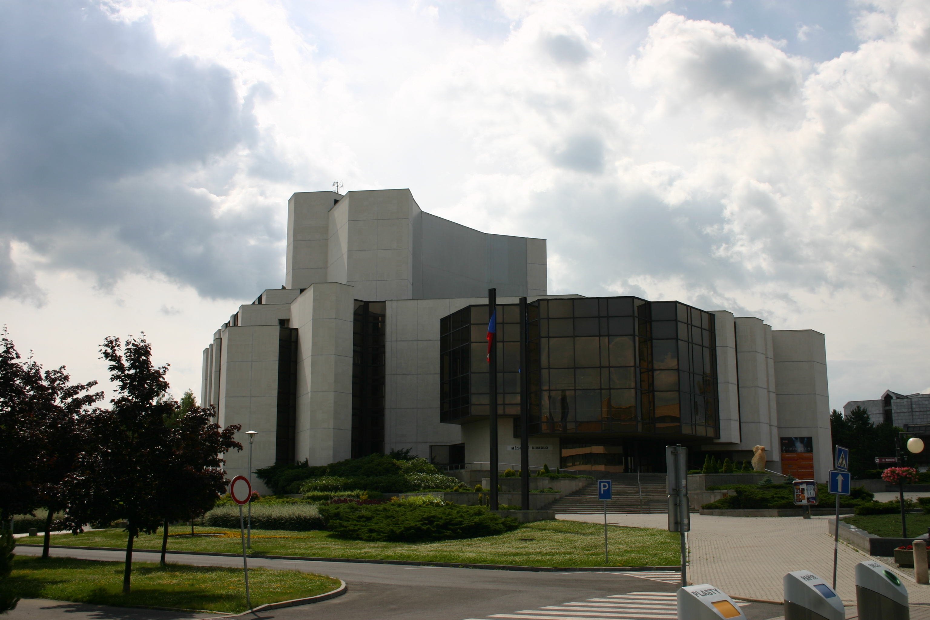 Nová budova mosteckého divadla